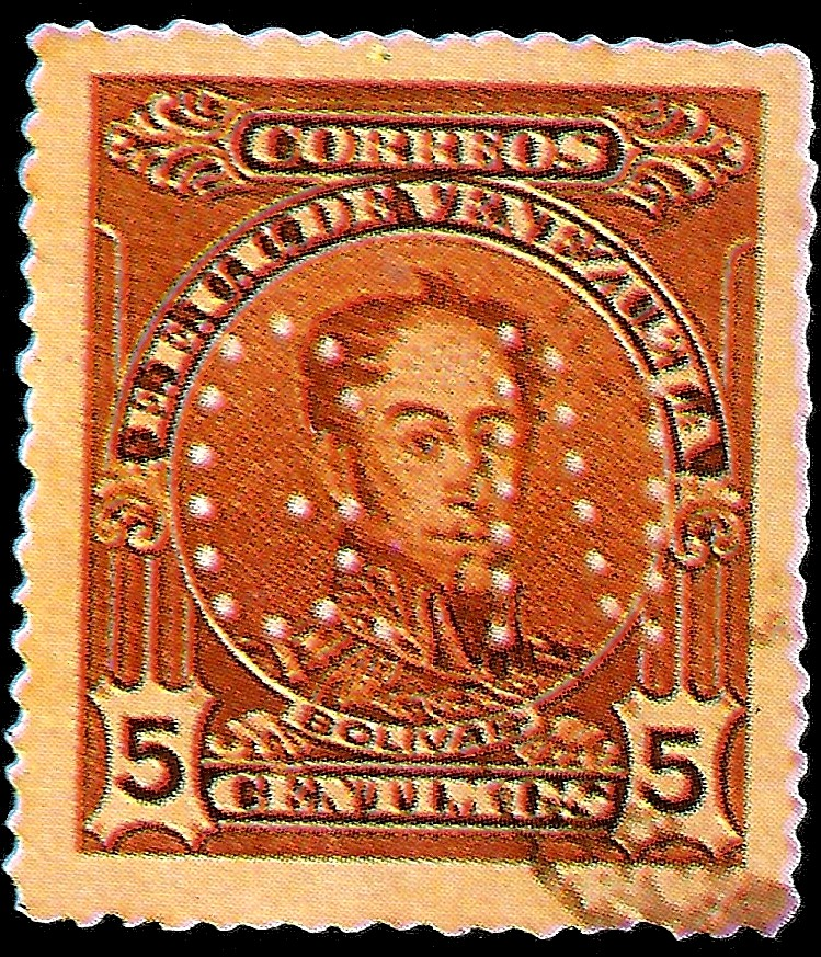 Estampilla con efigie del Libertador esta estampilla corresponde a un grupo de estampilla con el busto de El Libertador Simón Bolívar de diferentes valores faciales y las mismas están perforadas con la siglas GN (Gobieno Nacional), de las mismas se conocen emisiones para los años 1915, 1924, 1932 y 1939 (Dib, 1990)